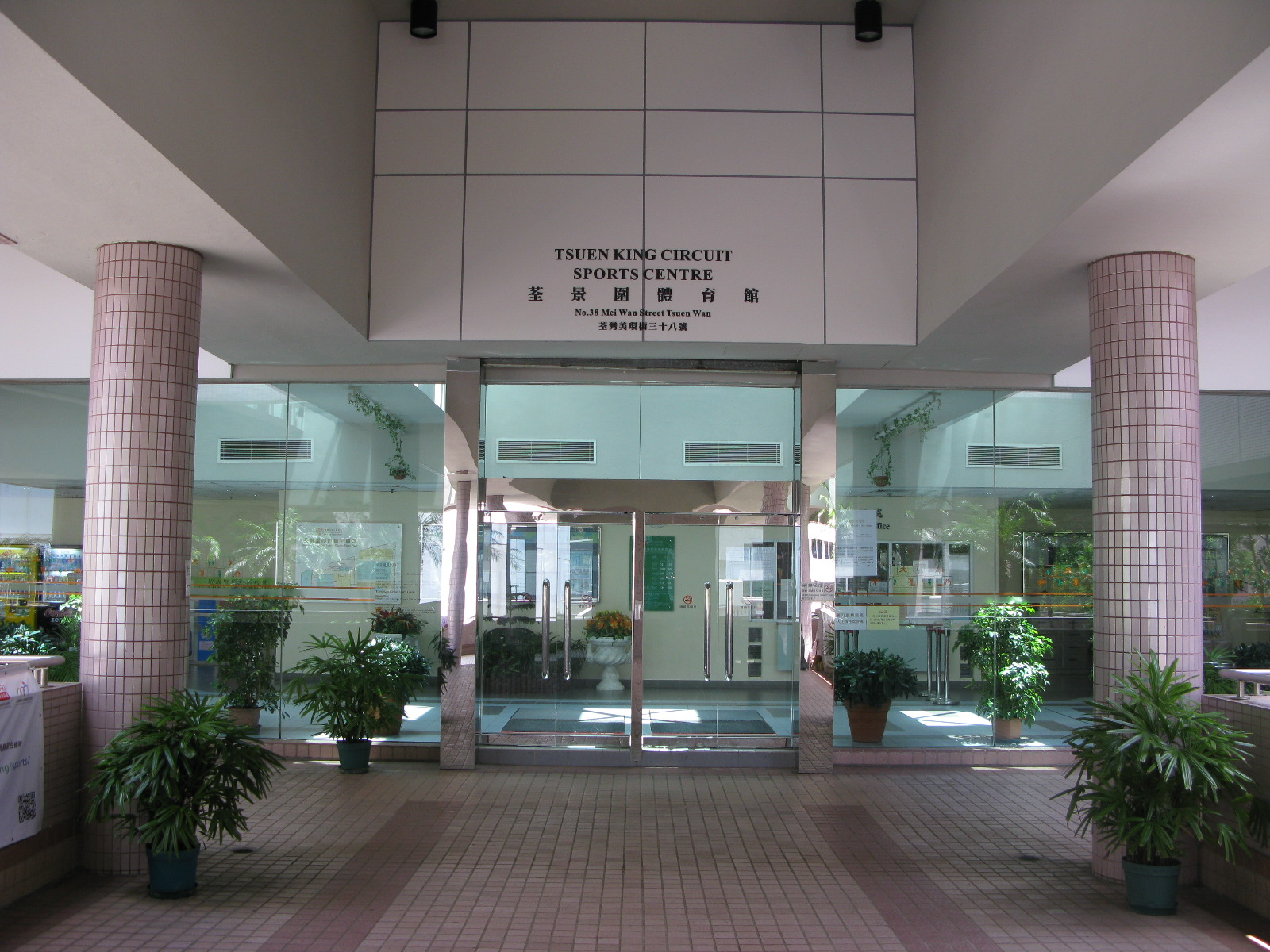 中文（香港）: 香港荃灣荃景圍體育館正門入口